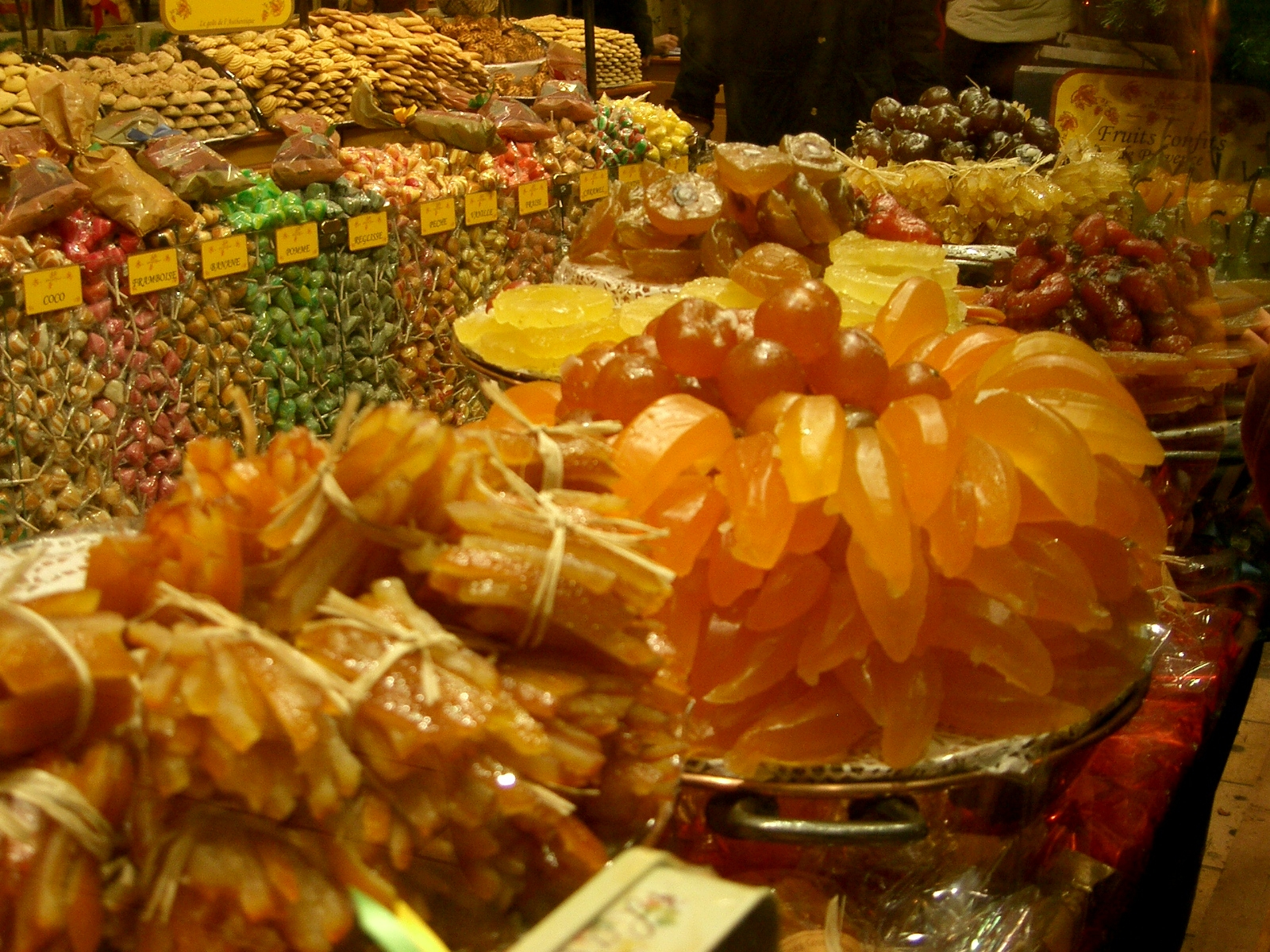 devanture de confiseur en Provence photo personnelle PRA